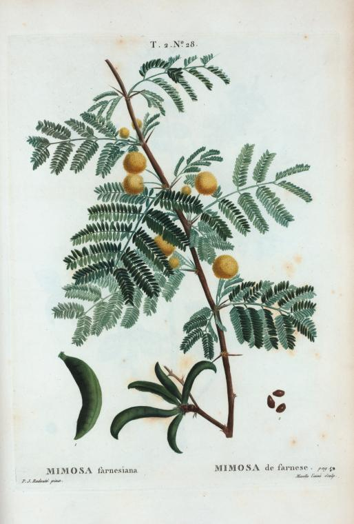 Mimosa farnesiana = Mimosa de farnese.